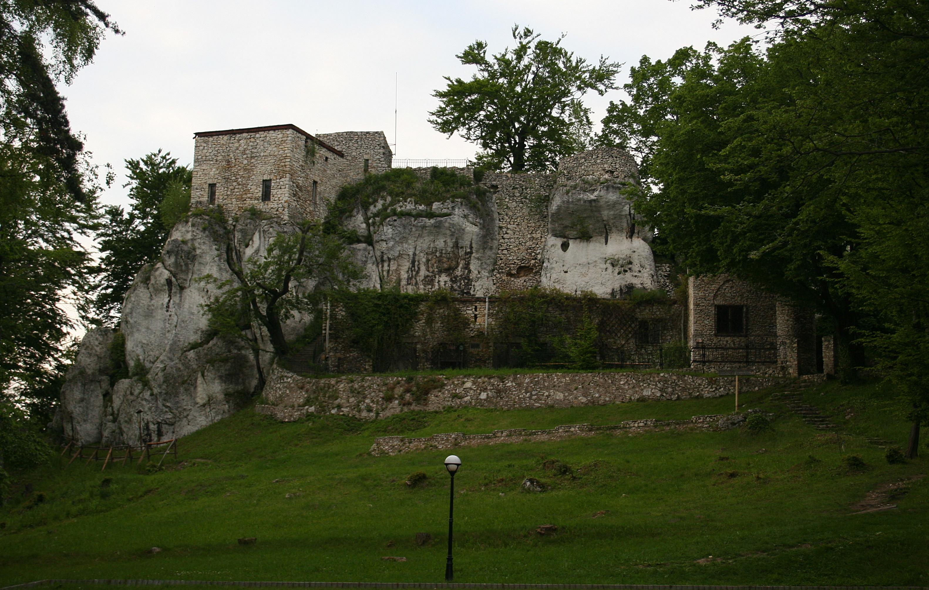 Zamek w Morsku